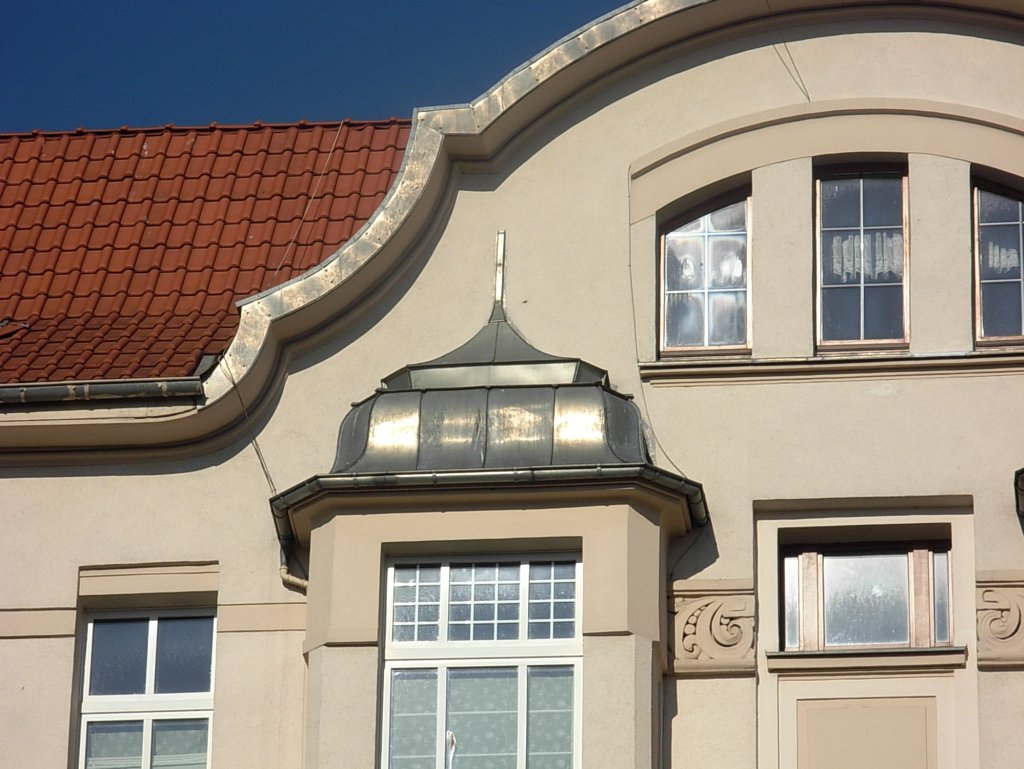 Kamienica ul. Mickiewicza 7 w Bydgoszczy, proj. Rudolf Kern, 1904-1905